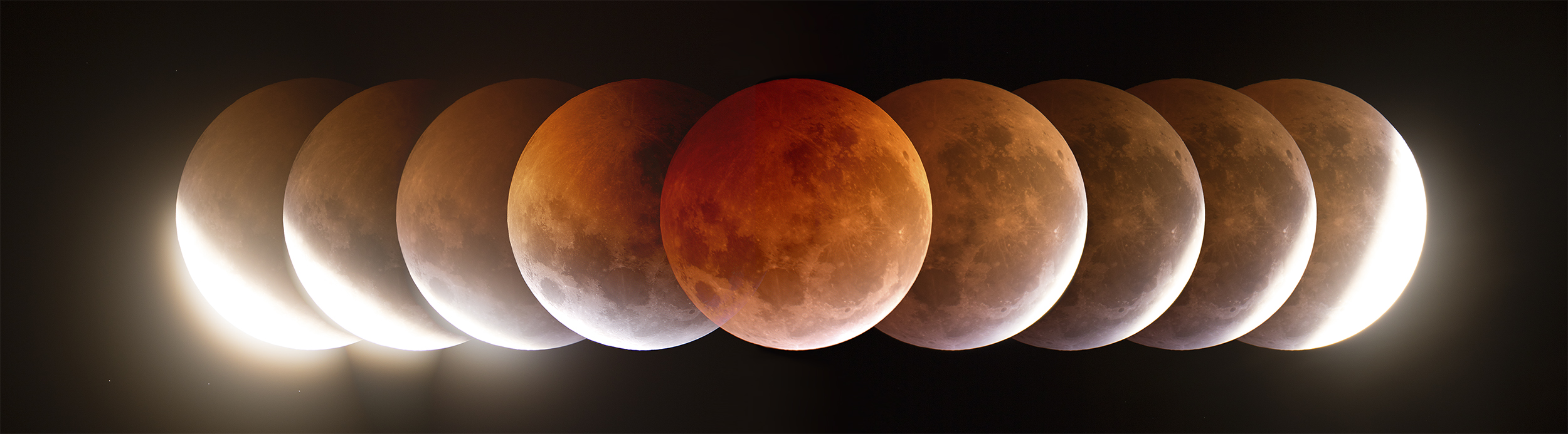 Secuencia Eclipse Lunar 2019. Autor: Luis Rojas